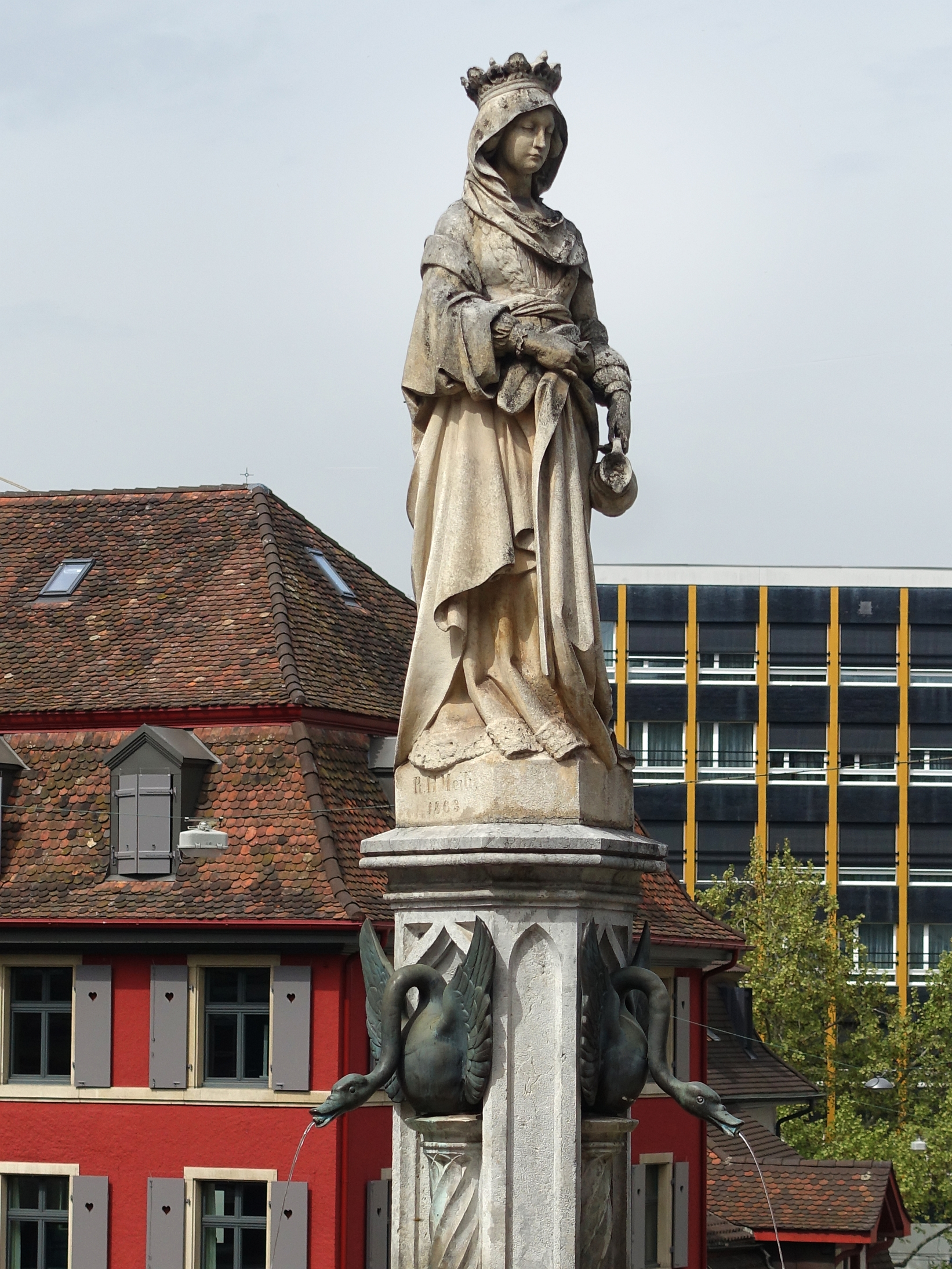 Heinrich Rudolf Meili (1827–1882) Bildhauer, Standbild der heiligen Elisabeth, Elisabeth von Thüringen, (1861–63), Klosterberg-Elisabethenstrasse, Basel. 47° 33′ 9.47″ N, 7° 35′ 28.47″ E